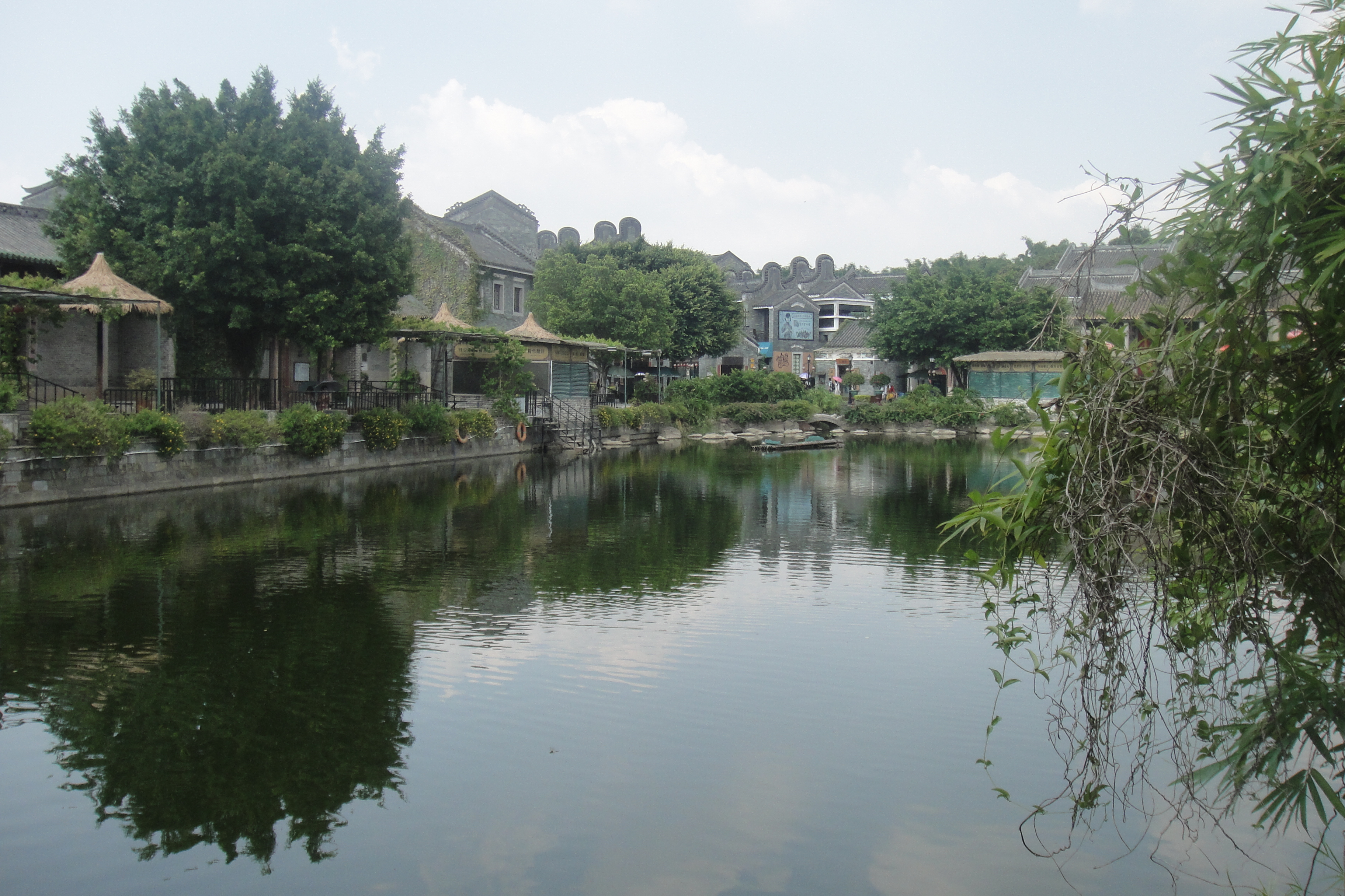 位於嶺南印象園。